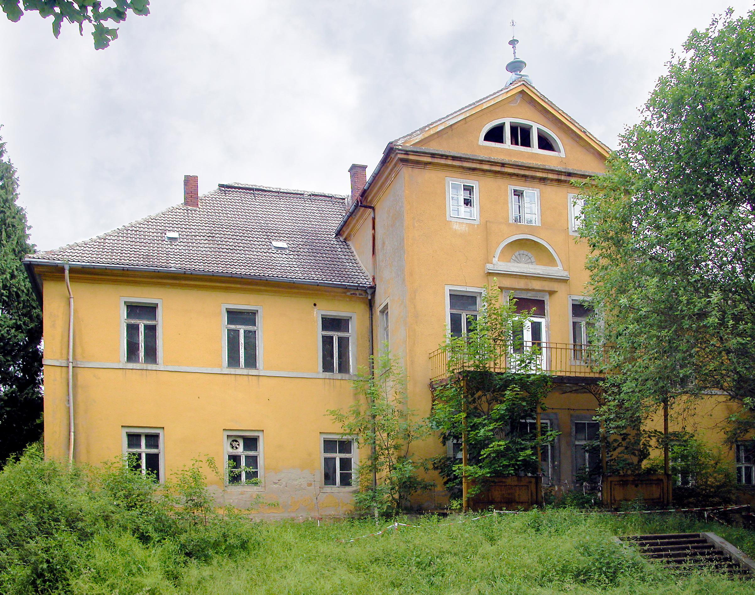 10.06.2012 02694 Kleinbautzen (Malschwitz) Am Schloß GMP: 51.210590,14.531381): Herrenhaus, um 1715 erbaut, Umbau im frühen 19. Jahrhundert. In der DDR Wohnhaus, dann Schule und Kindergarten. Zuletzt Lehrlingswohnheim der LPG Kleinbautzen. 1998 privatisiert. [DSCNn4078.TIF]20120610055DR.JPG(c)Blobelt Hornjoserbsce: Knježi dom w Budyšinku, Malešanska gmejna